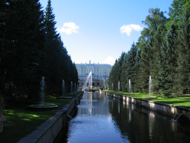 Hauptpalast Peterhof